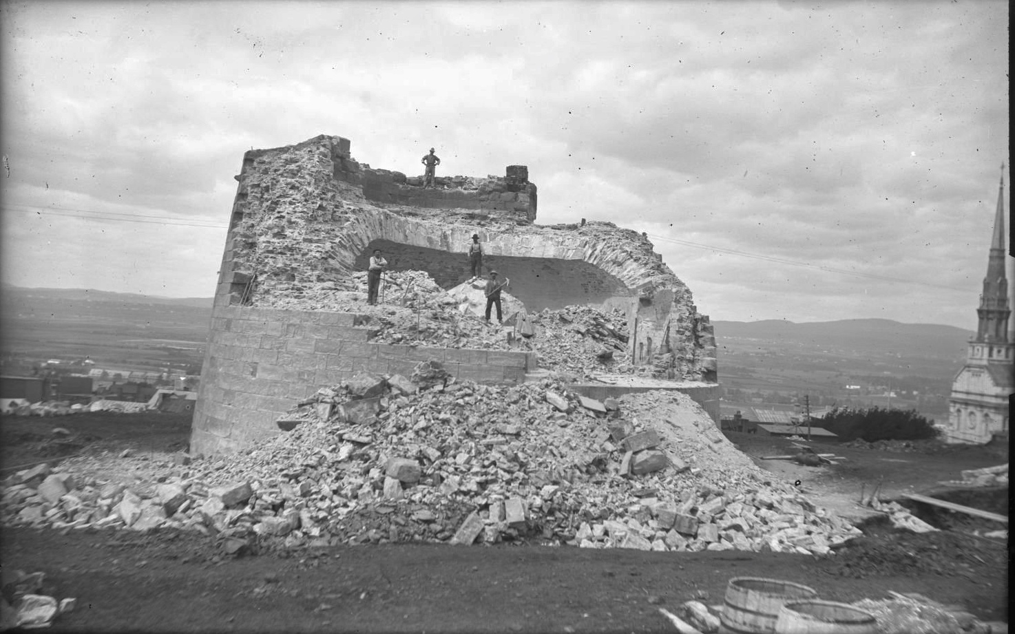 Démolition de la tour Martello numéro 3 à Québec, près de l'actuel boulevard René-Lévesque est. L'image donne une idée du caractère massif de ces structures. À l'arrière-plan, à droite, le clocher de l'église Saint-Jean Baptiste. La tour a été démolie pour permettre la construction du McKenzie Memorial Building de l'ancien hôpital Jeffery-Hale.